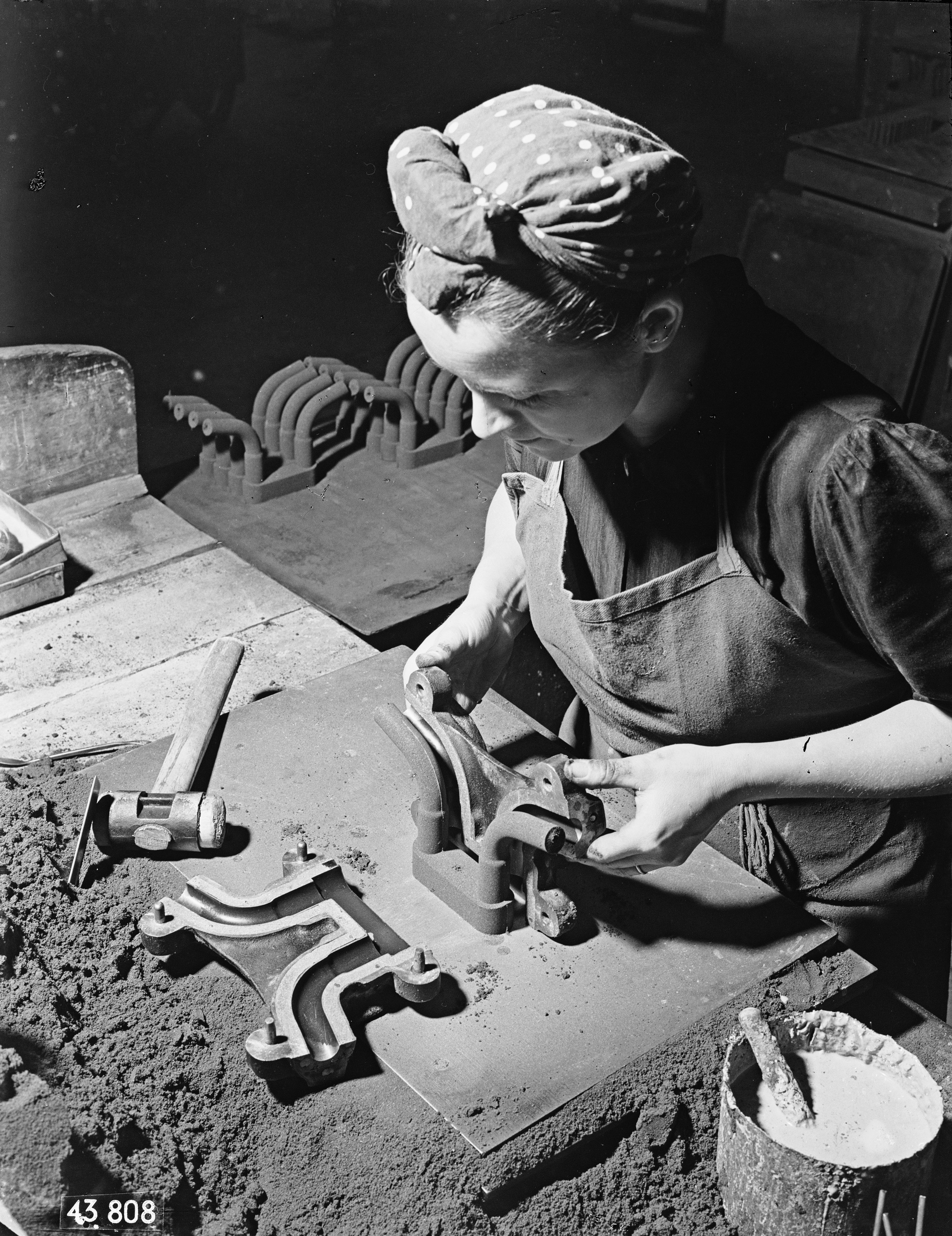 Kernmacherin bei der Arbeit im Werk III der Georg Fischer AG im Mühlental in Schaffhausen